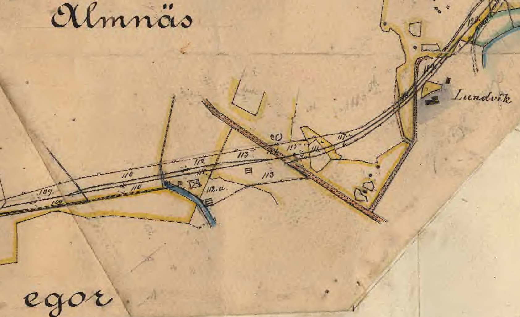 Avsnitt för Norra Södermanlands järnväg: Almnäs station